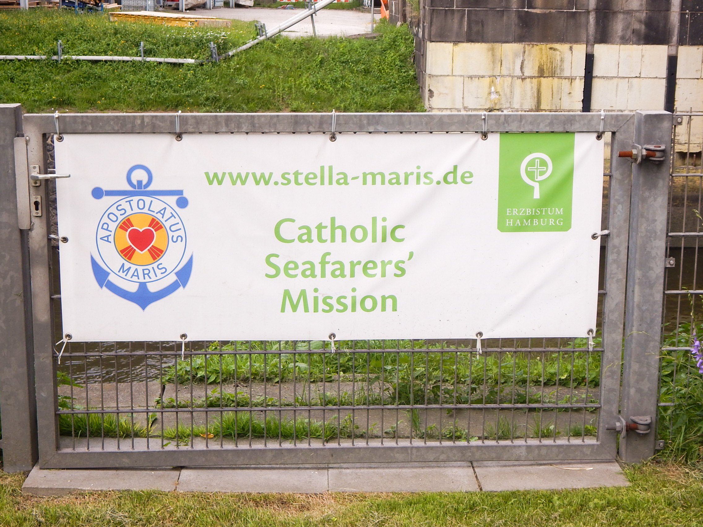 Katholische Seemannsmission Stella Maris Hamburg, Plakat